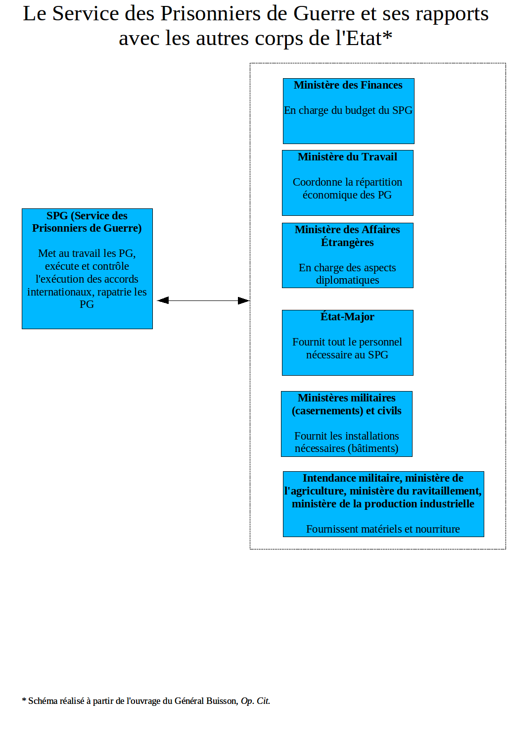 Source : Général Buisson, Historique du service des prisonniers de guerre de l’Axe, 1943-1948, Paris, ministère de la Défense nationale, 1948